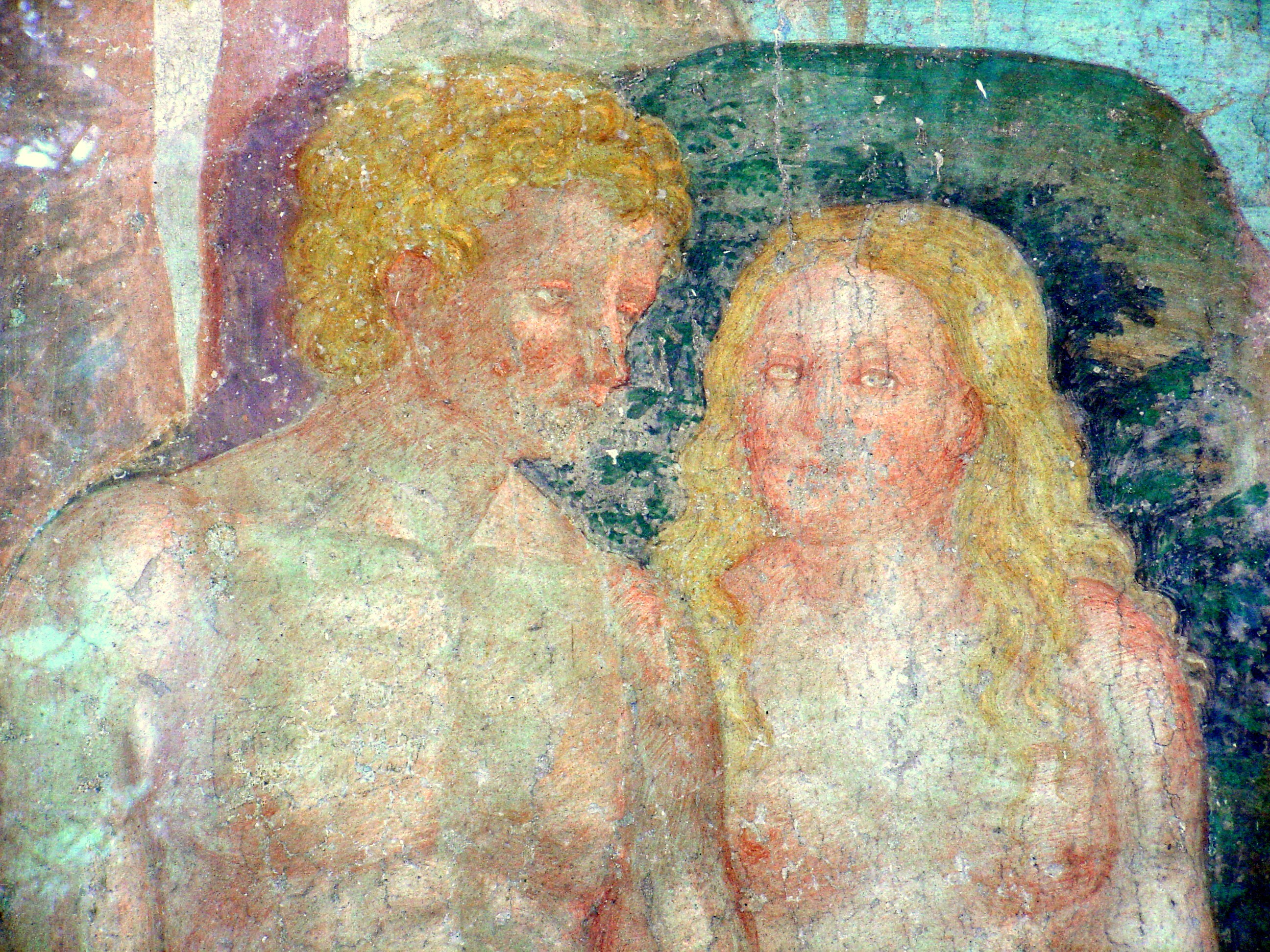 Santa maria dei ghirli, giudizio universale, famiglia de veris, 1400 10